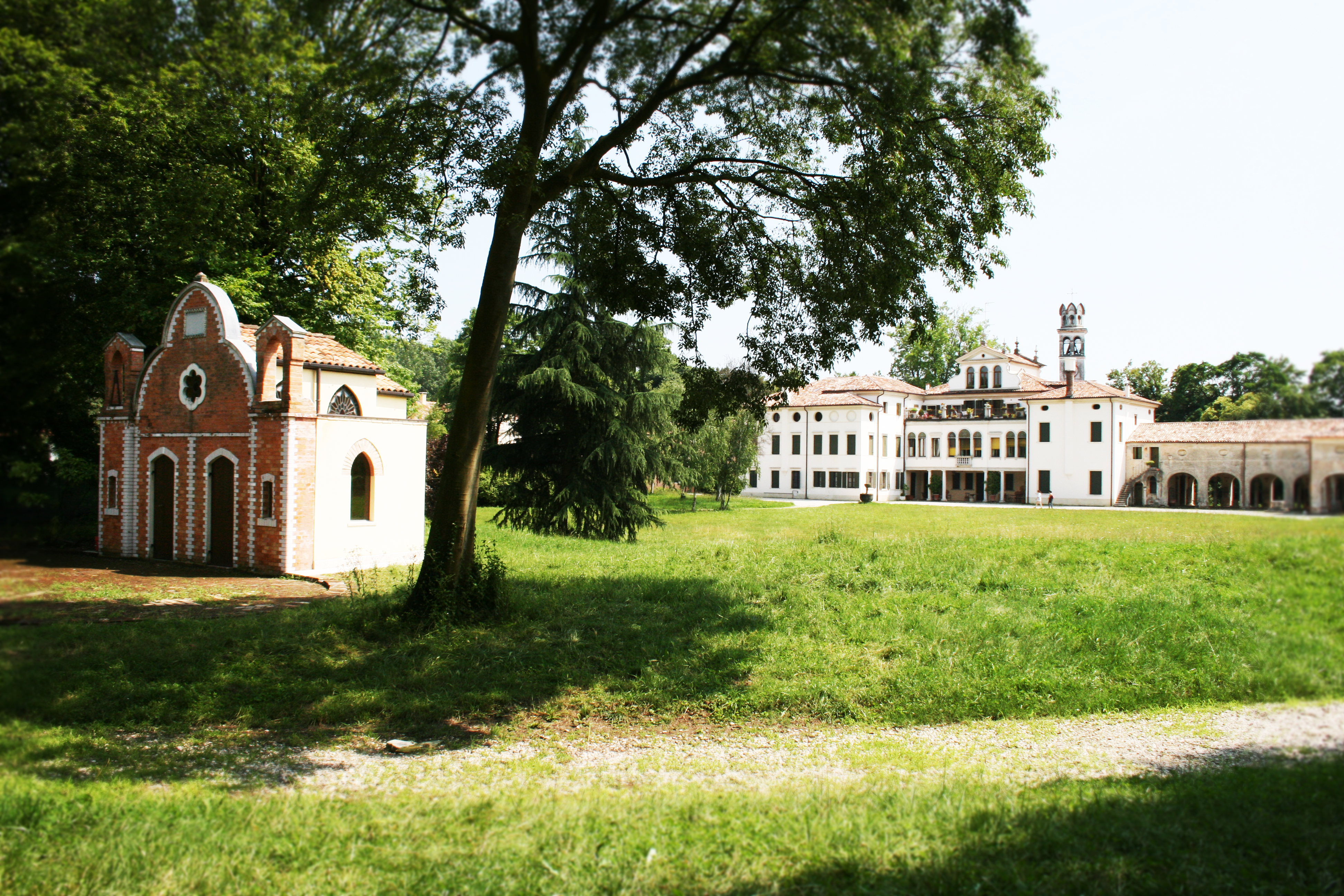 Complesso della villa